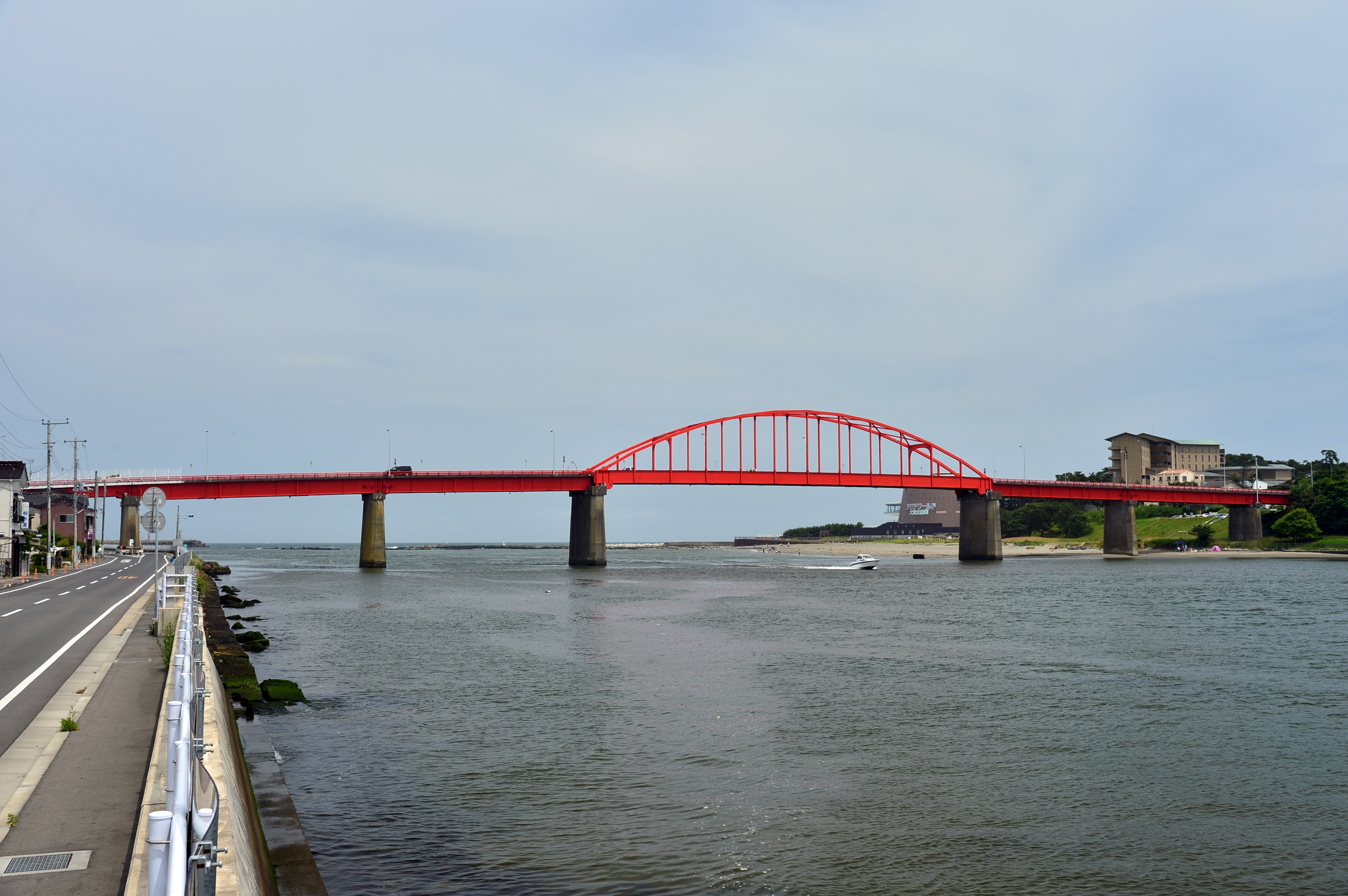 涸沼川の上流側から見た海門橋（茨城県）